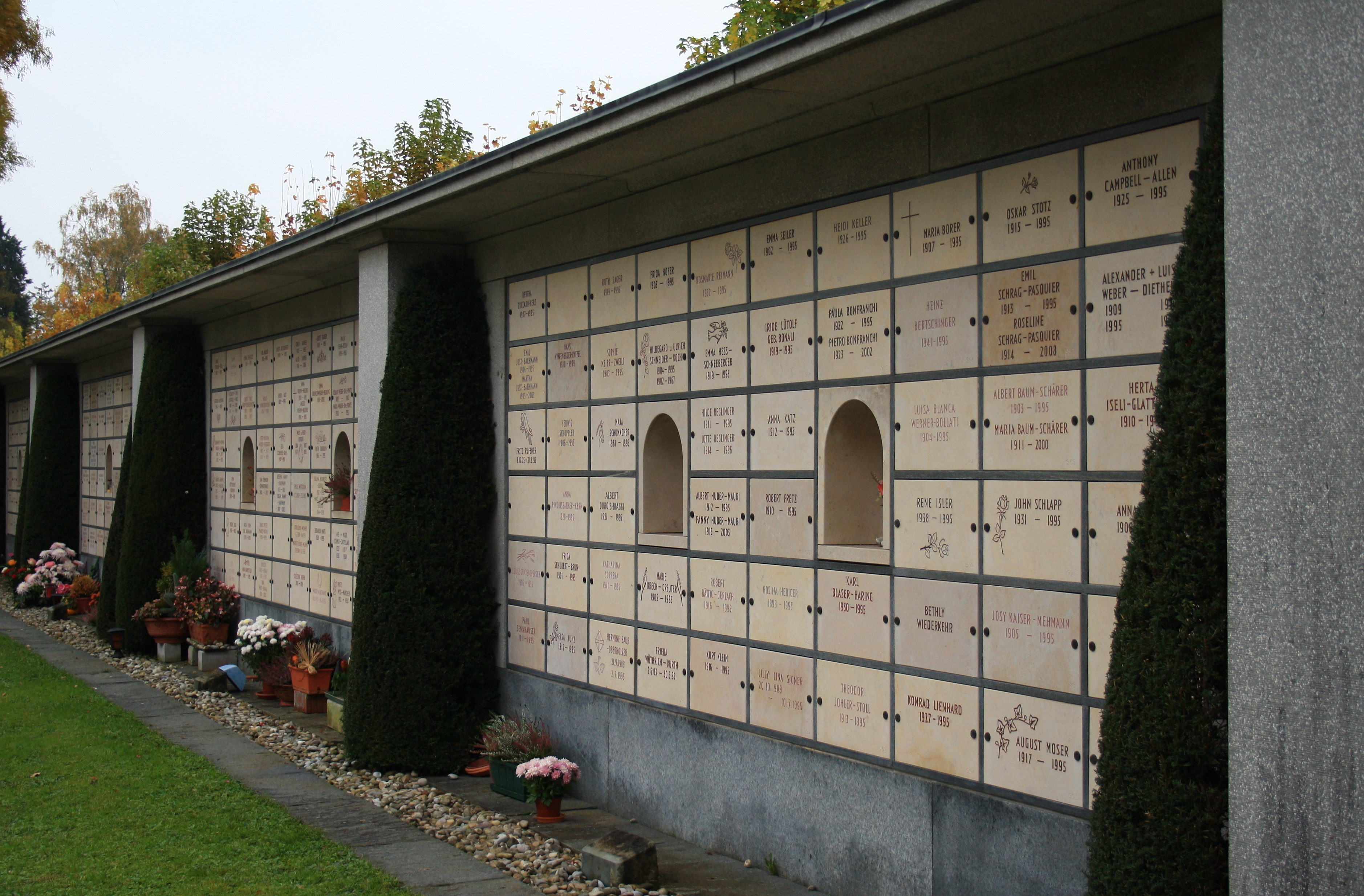 Friedhof Sihlfeld in Zürich (Switzerland)